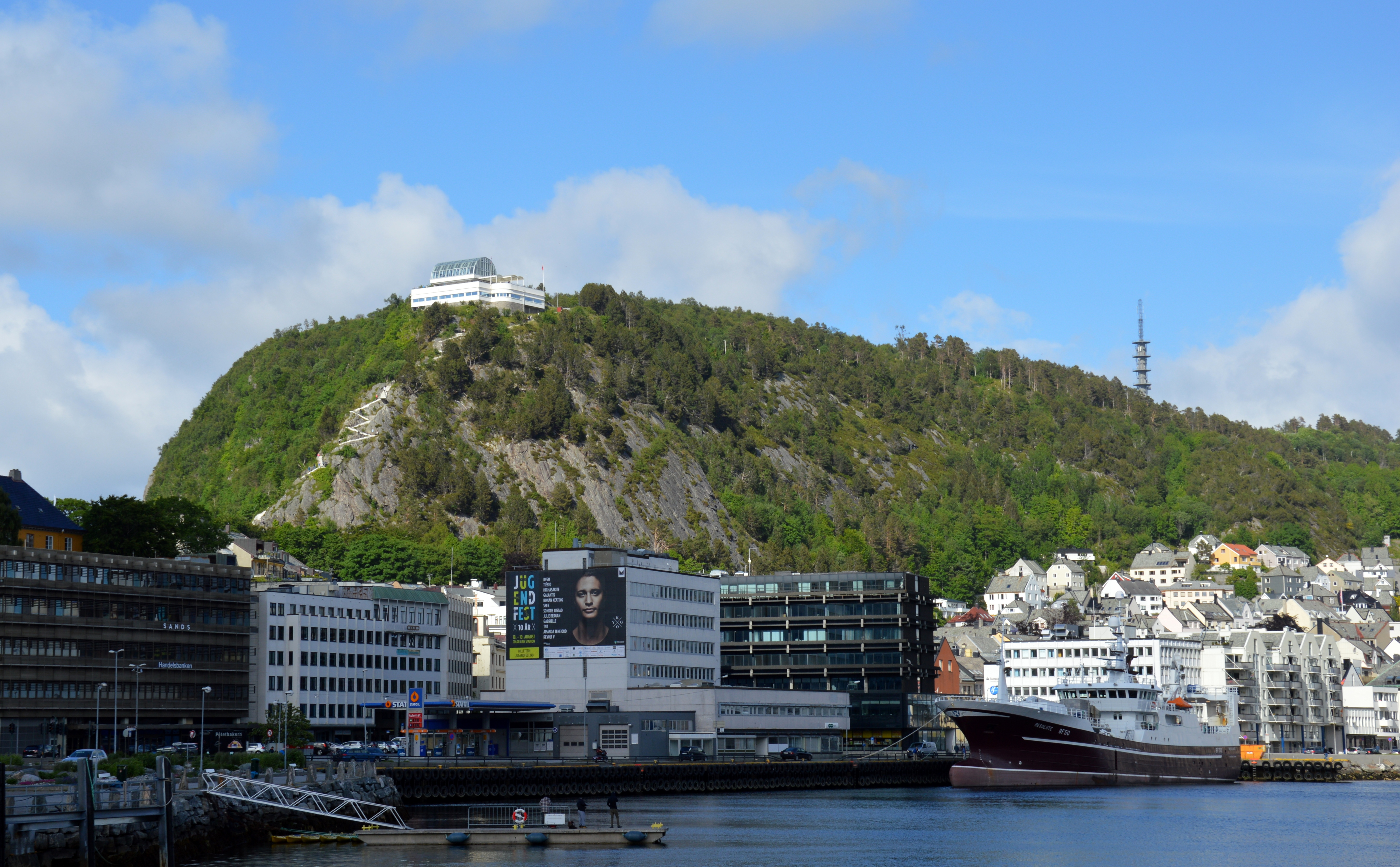 Berg Aksla über Alesund